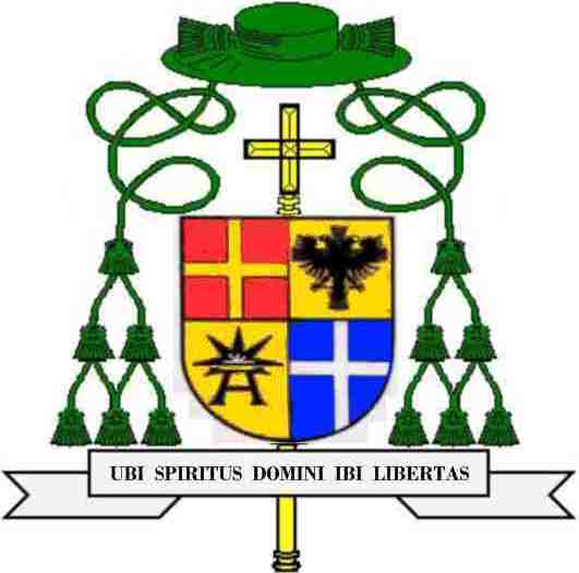 Wappen Reinhard Marx, Weihbischof in Paderborn (1996-2001)